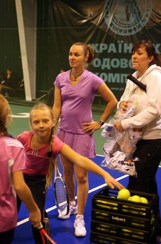 Мартіна в тенісному центрі